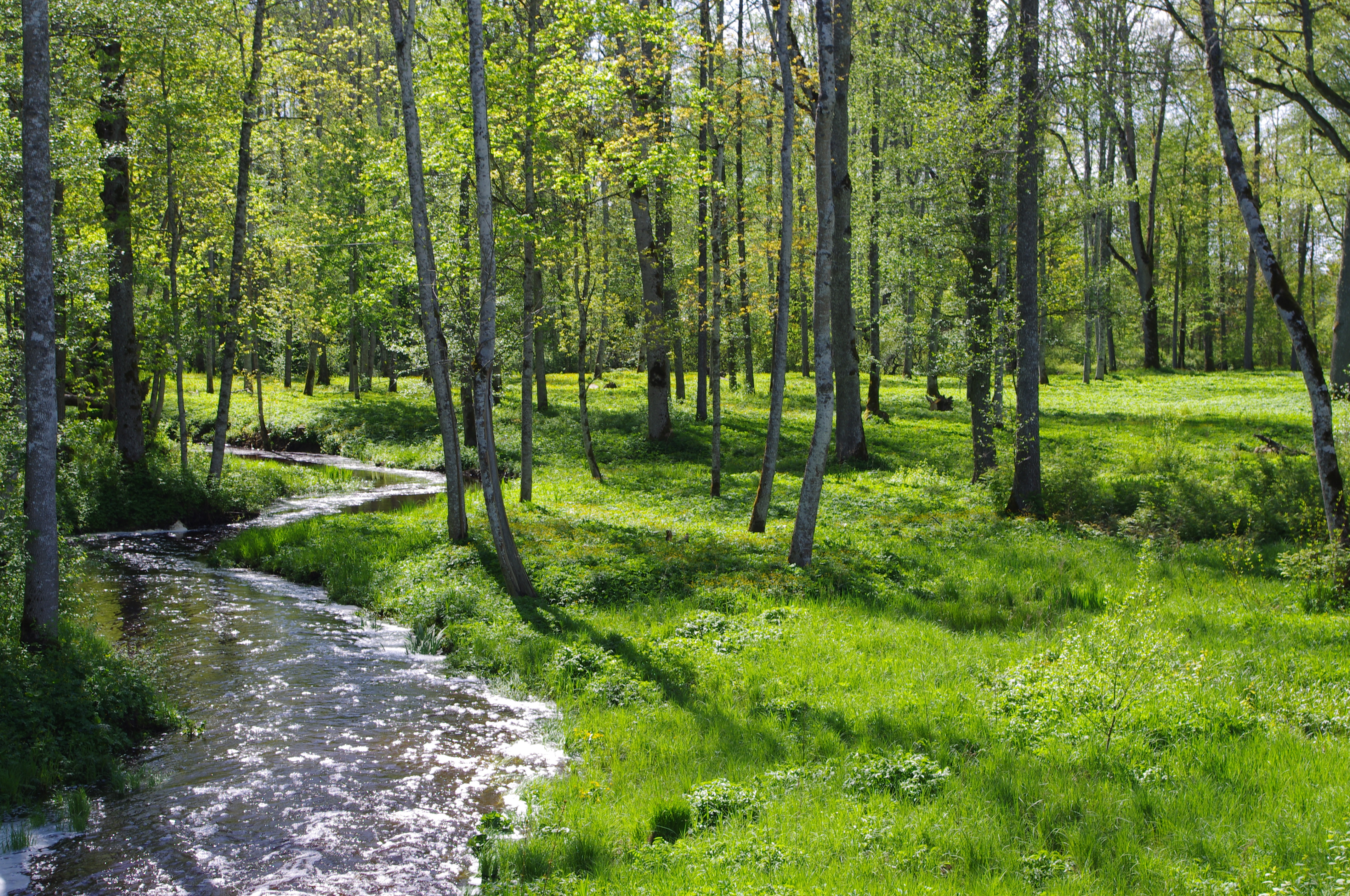 Käru mõisa park